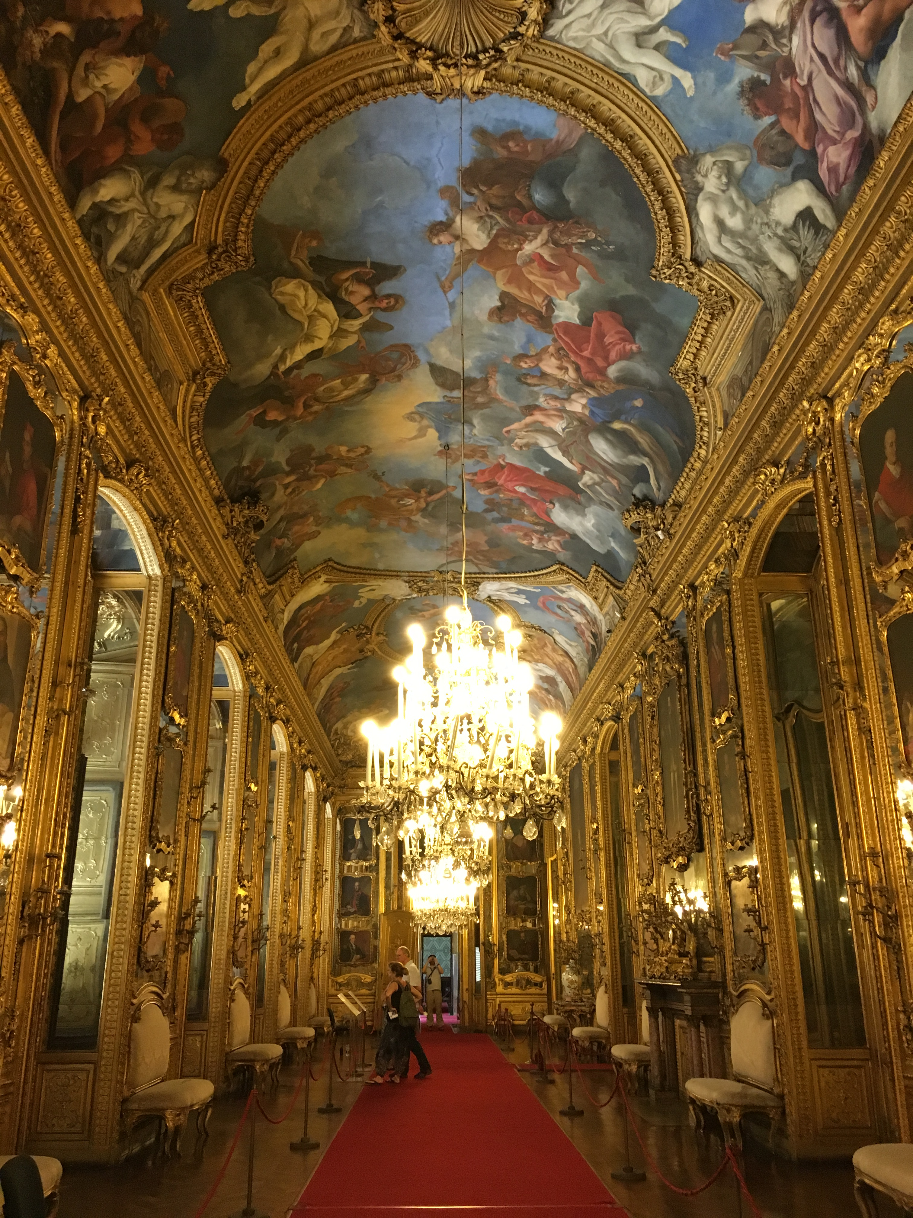 Galleria del Daniel Palazzo reale